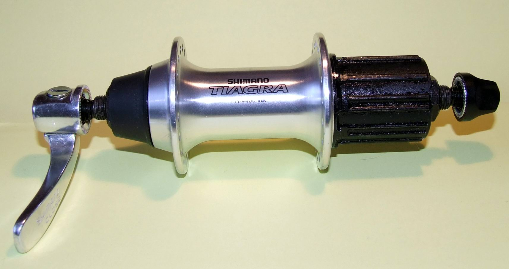 Piasta Shimano Tiagra.